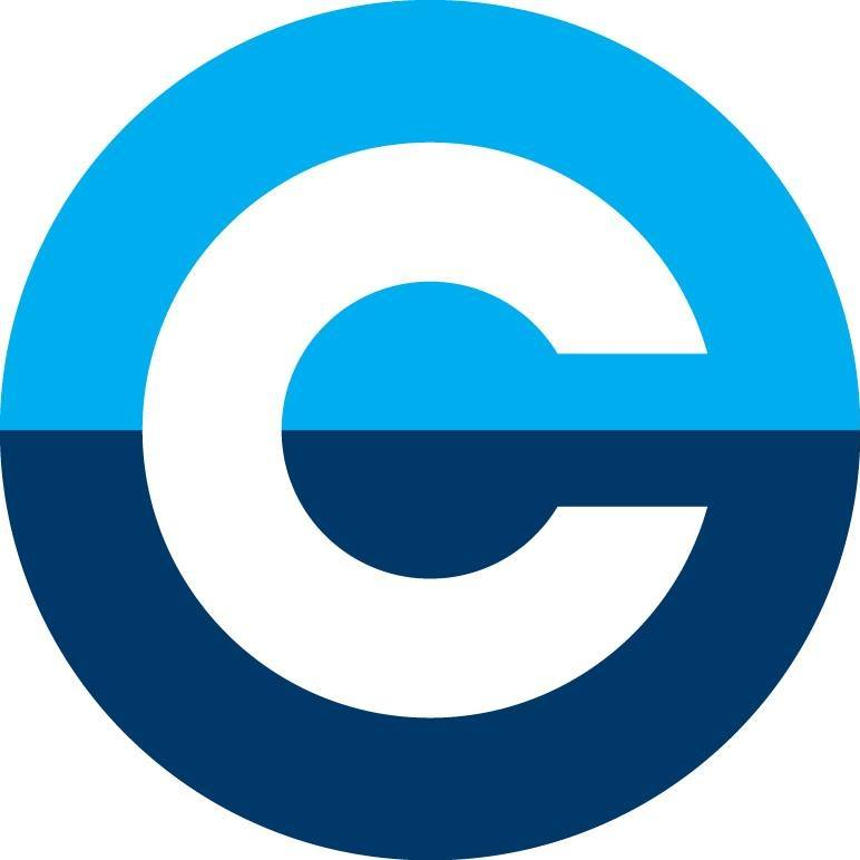 Лого на Център за градска мобилност- София